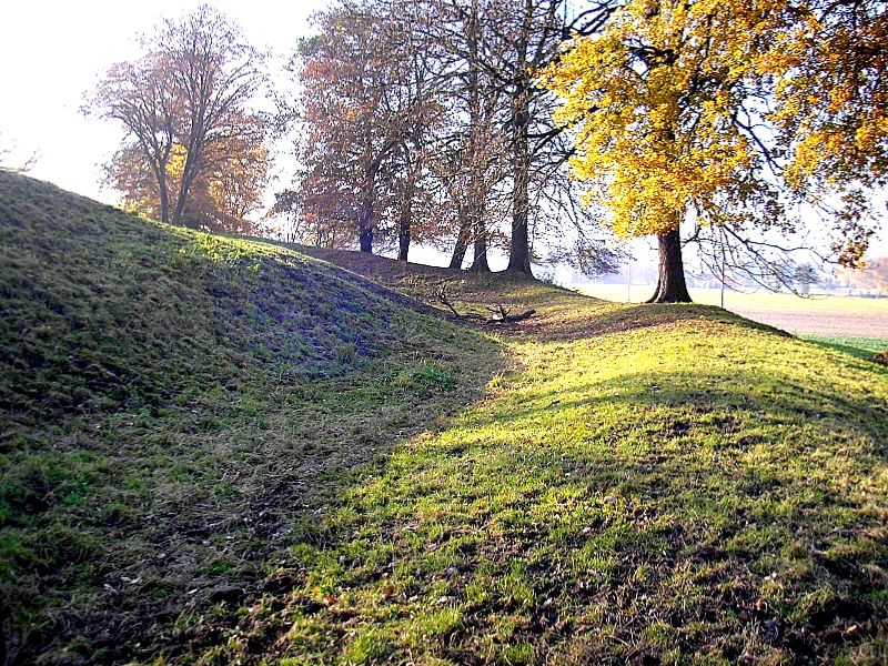 Burgstall Dasing (Landkreis Aichach-Friedberg, Bayerisch-Schwaben). Die Erdwerke der Nordseite. Blick nach Westen. Eigene Aufnahme, Nov. 2007 / Former Dasing Castle near Augsburg (Bavaria, Germany). The earthworks at the north of the castle, looking west. Own photo, Nov. 2007